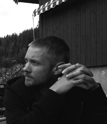 Fotografi av Martin Kellerman